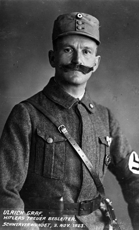 Ulrich Graf Ulrich Graf [Bildaufschrift: Ulrich Graf Hitlers treuer Begleiter, schwer verwundet, 9. Nov. 1923] Abgebildete Personen: Graf, Ulrich: Stadtrat München, am 9.11.1923 Lebensretter von A. Hitler, Deutschland